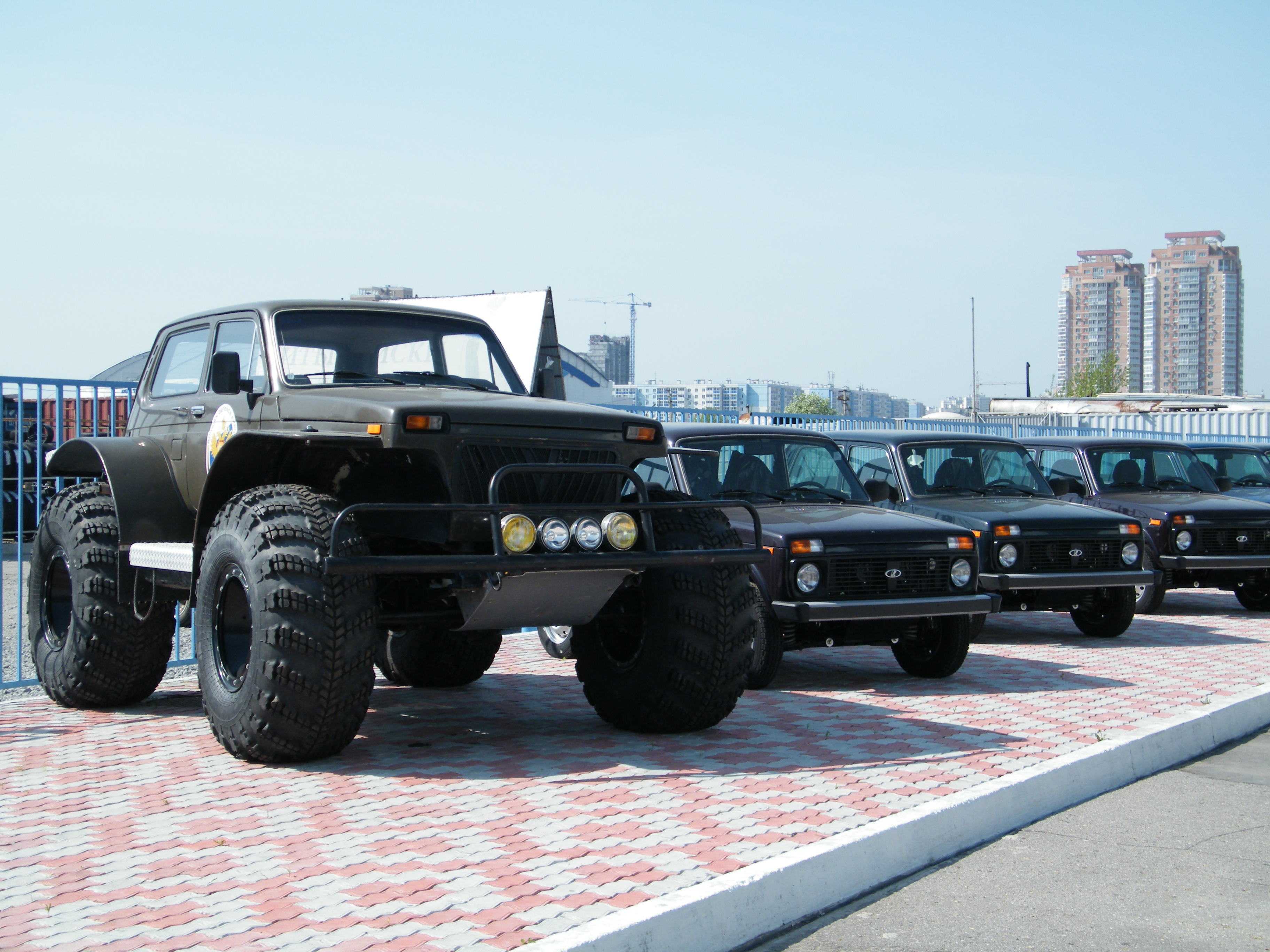 VAZ-1922